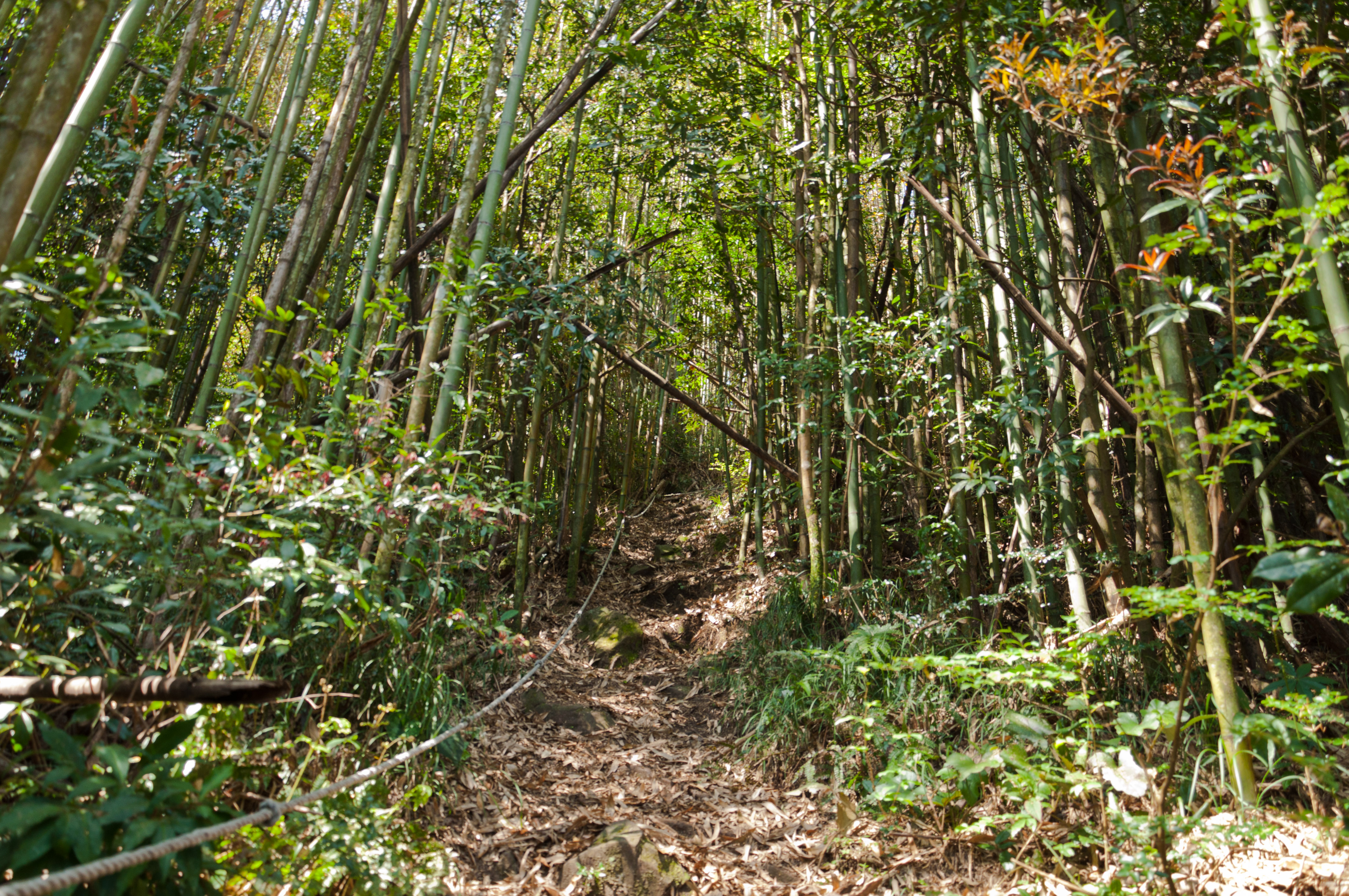 五峰鳥嘴山